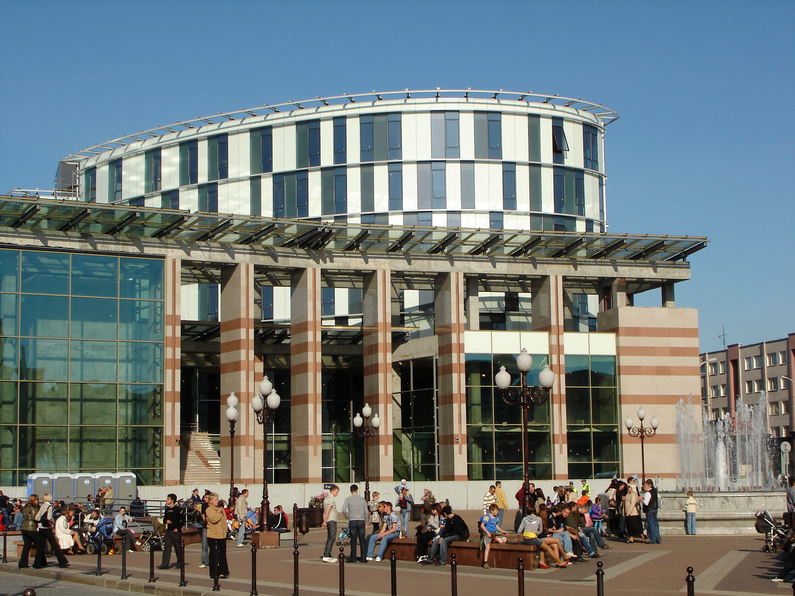 Russische Föderation: Siegesplatz in Kaliningrad